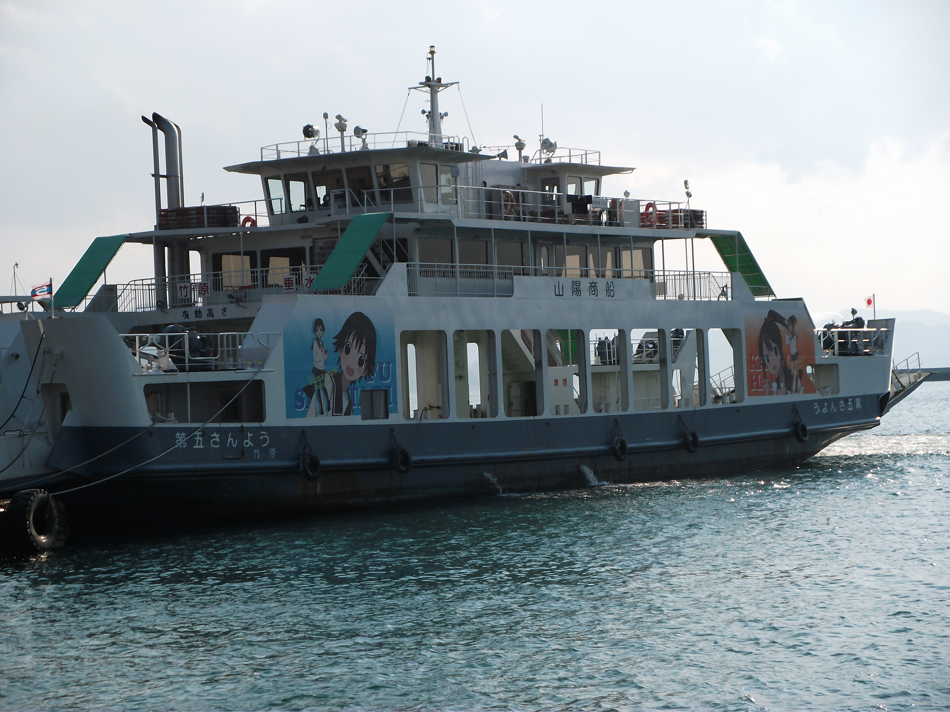 山陽商船のフェリー、第5さんよう。竹原港にて。